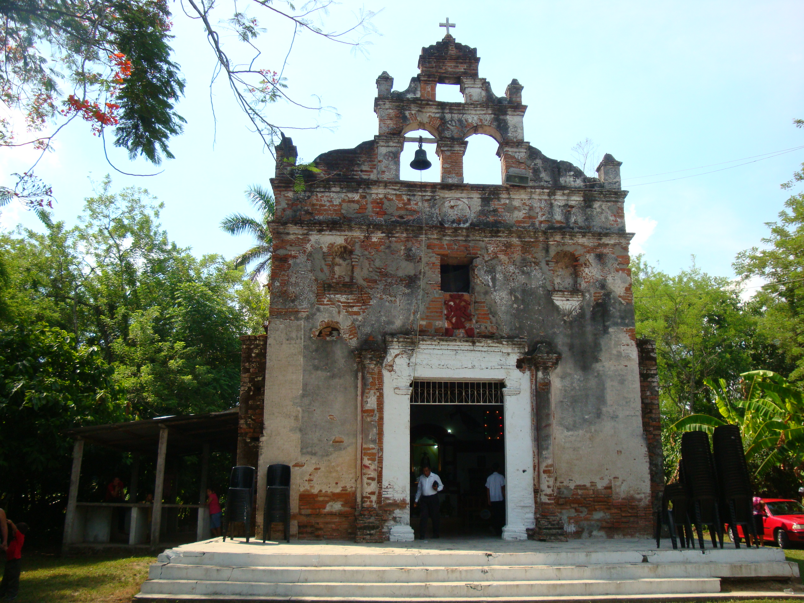 Fachada de la iglesia "Las Mirandillas" construida en 1724 y localzada en el municipio de Cunduacán estado de Tabasco México.